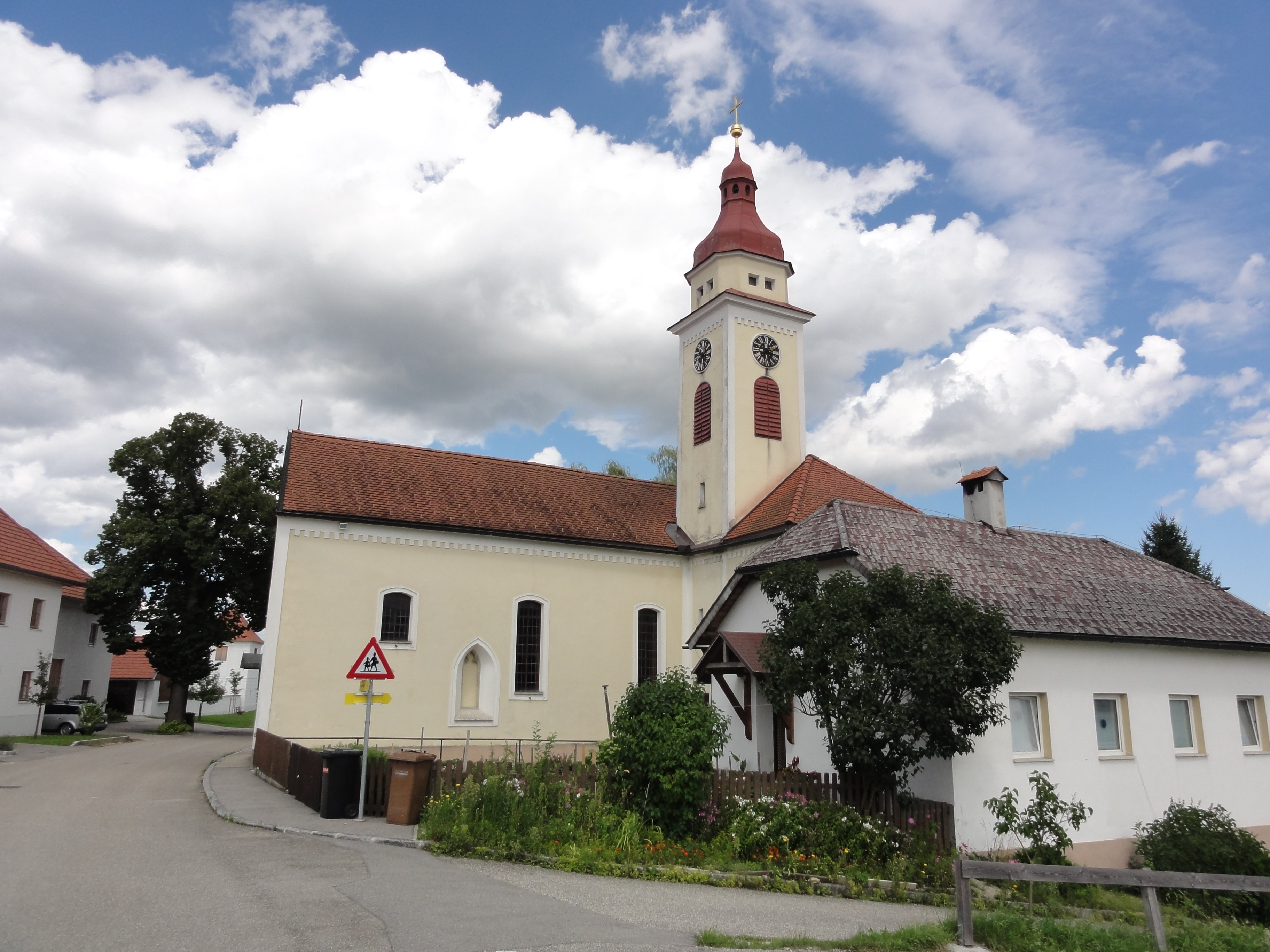 Kath. Filialkirche hl. Thomas von Canterbury